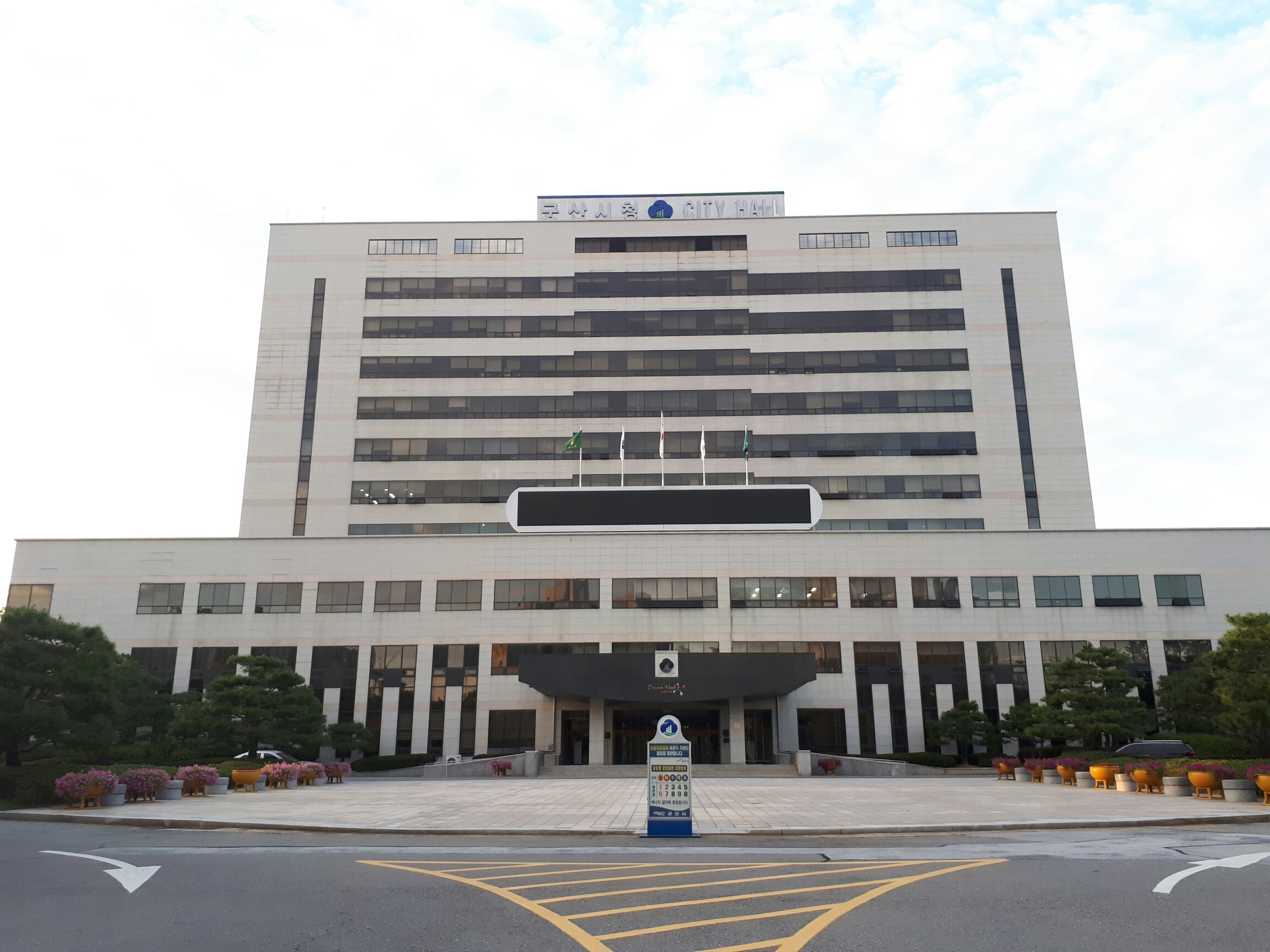 전라북도 군산시 시청로 17에 위치한 군산시청